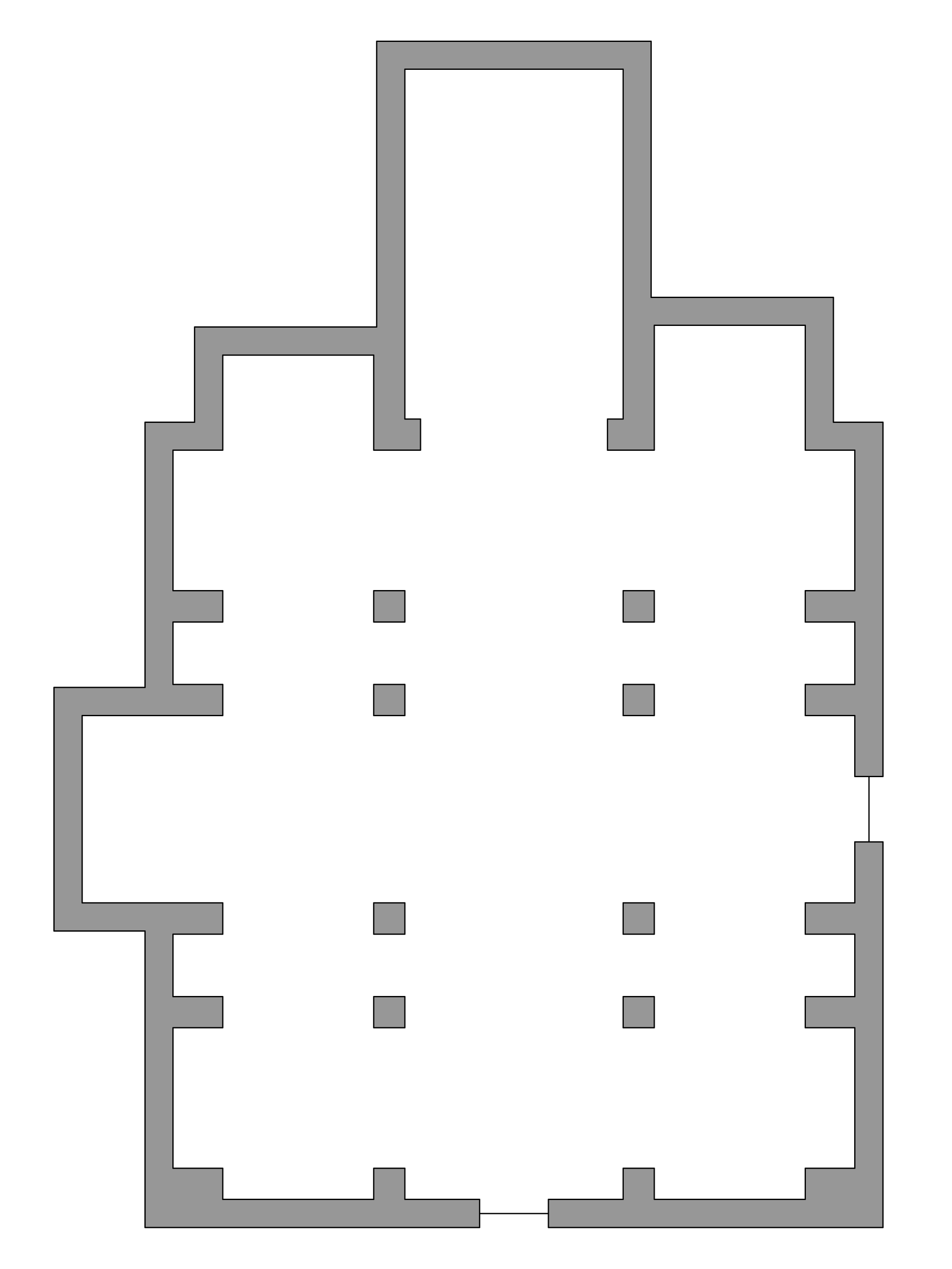 San Faustino maggiore (Brescia) (pianta)